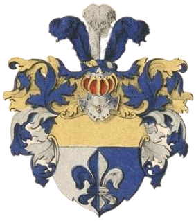 Bunge suguvõsa aadlivapp